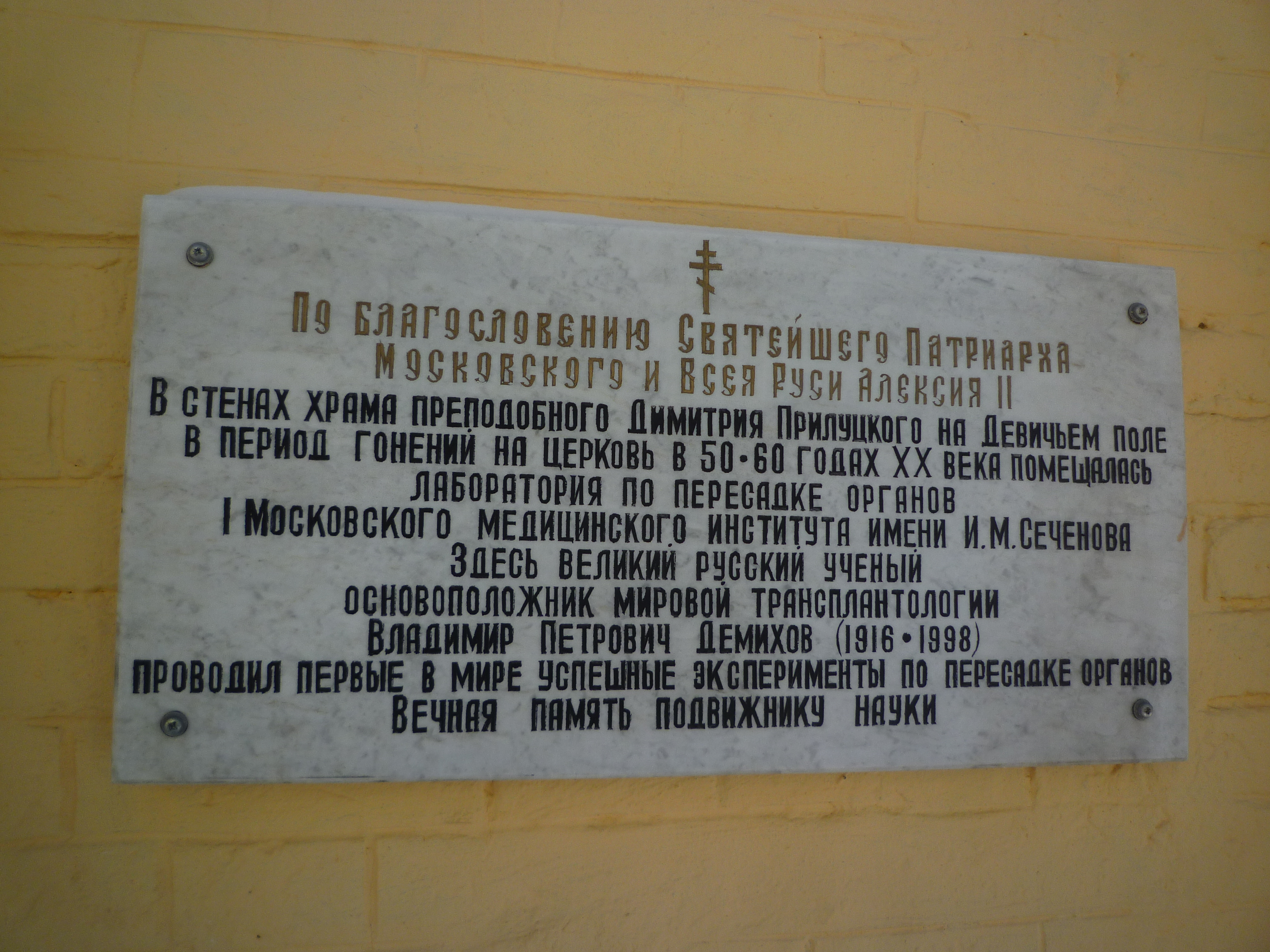 Памятная табличка на Церковь Димитрия Прилуцкого на Девичьем поле, посвященная деятельности Демихов, Владимир Петрович